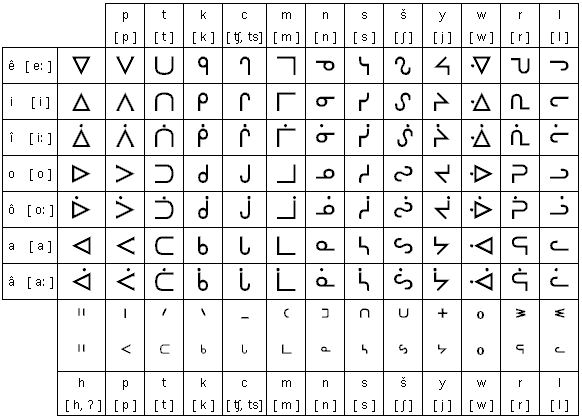 Cree syllabic